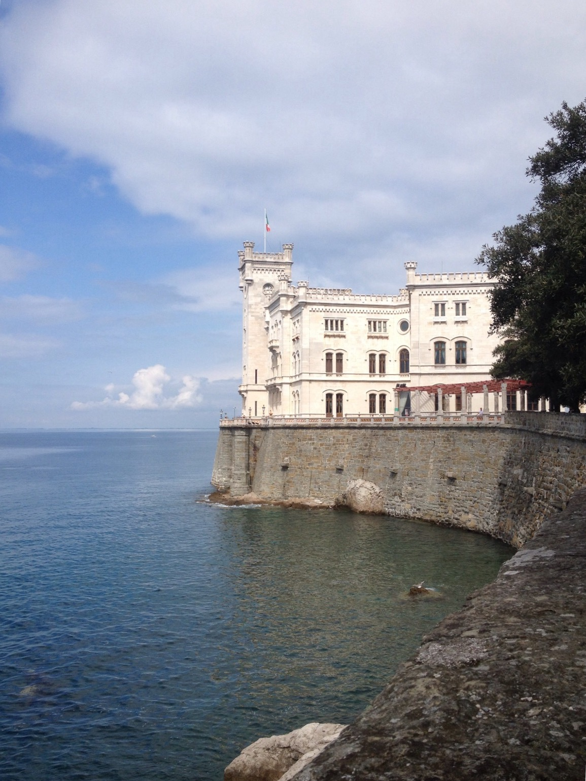 Riserva Naturale Marina di Miramare This is a photo of a monument which is part of cultural heritage of Italy. The authorisation for taking photos of this object was provided by the World Wide Fund for Nature Italy.